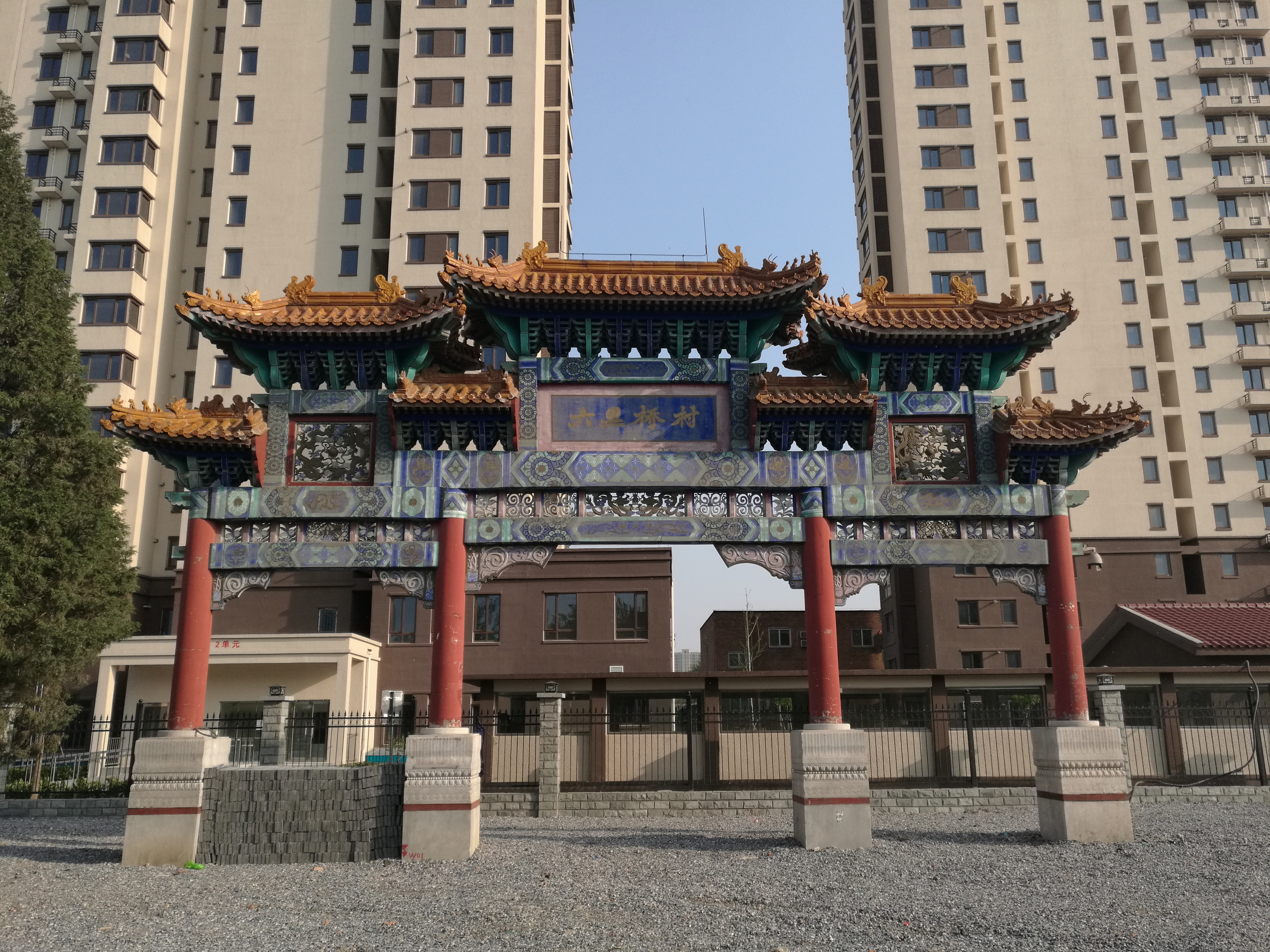 中文（中国大陆）: 六里桥村牌坊